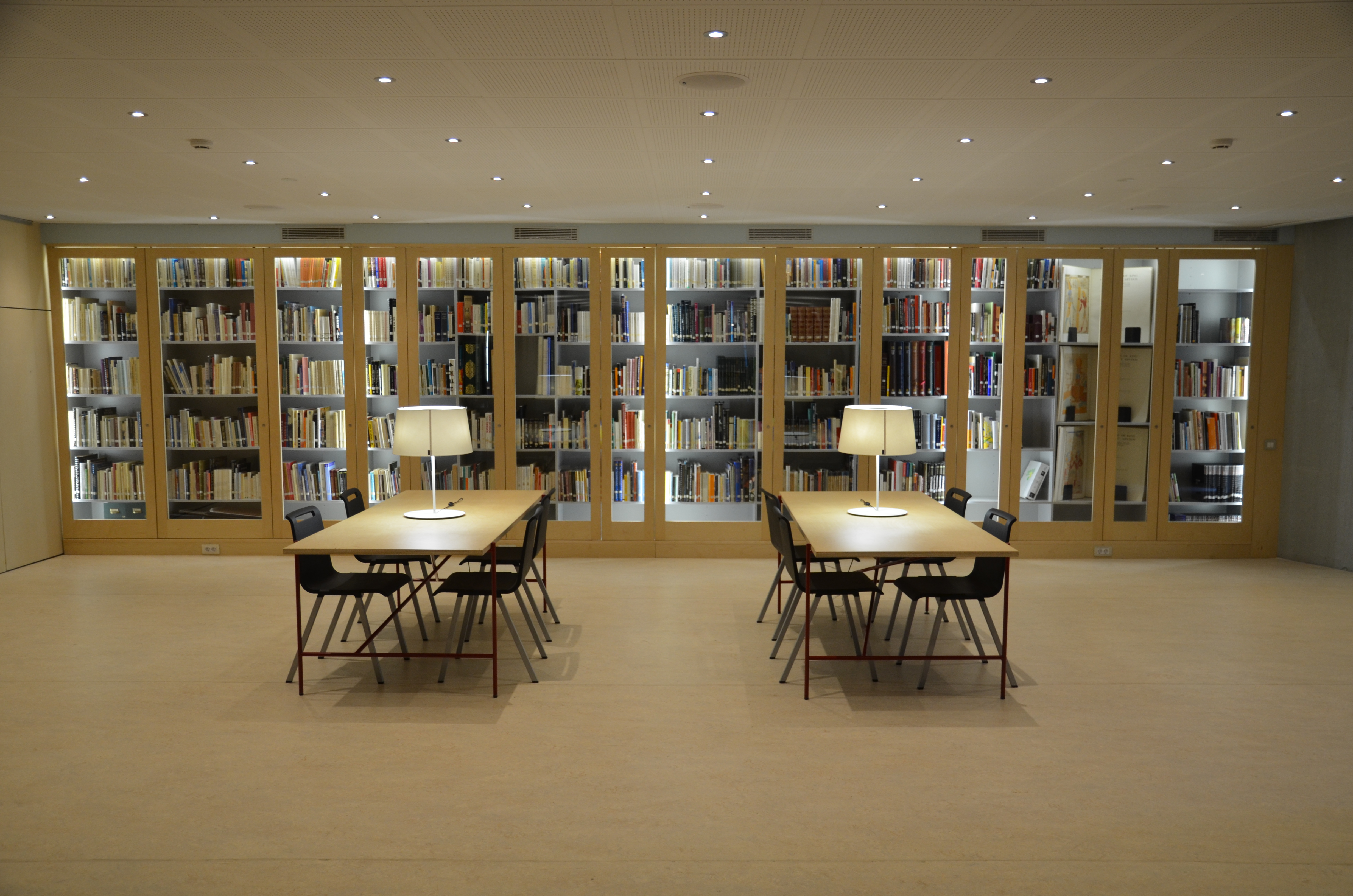 Biblioteca Funerària de Cementiris de Barcelona